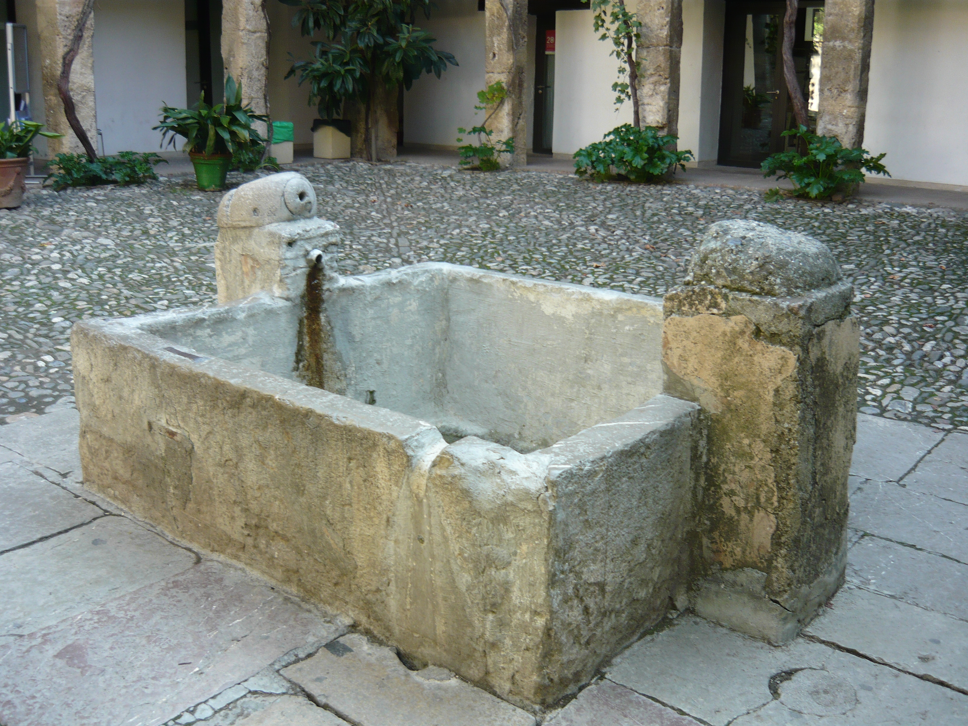 Pila de piedra en el centro del patio del Corral del Carbón, en Granada.